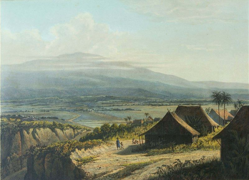 Litho. Litho naar een oorspronkelijk schilderij van A. Salm.. Een landschap in Bantam